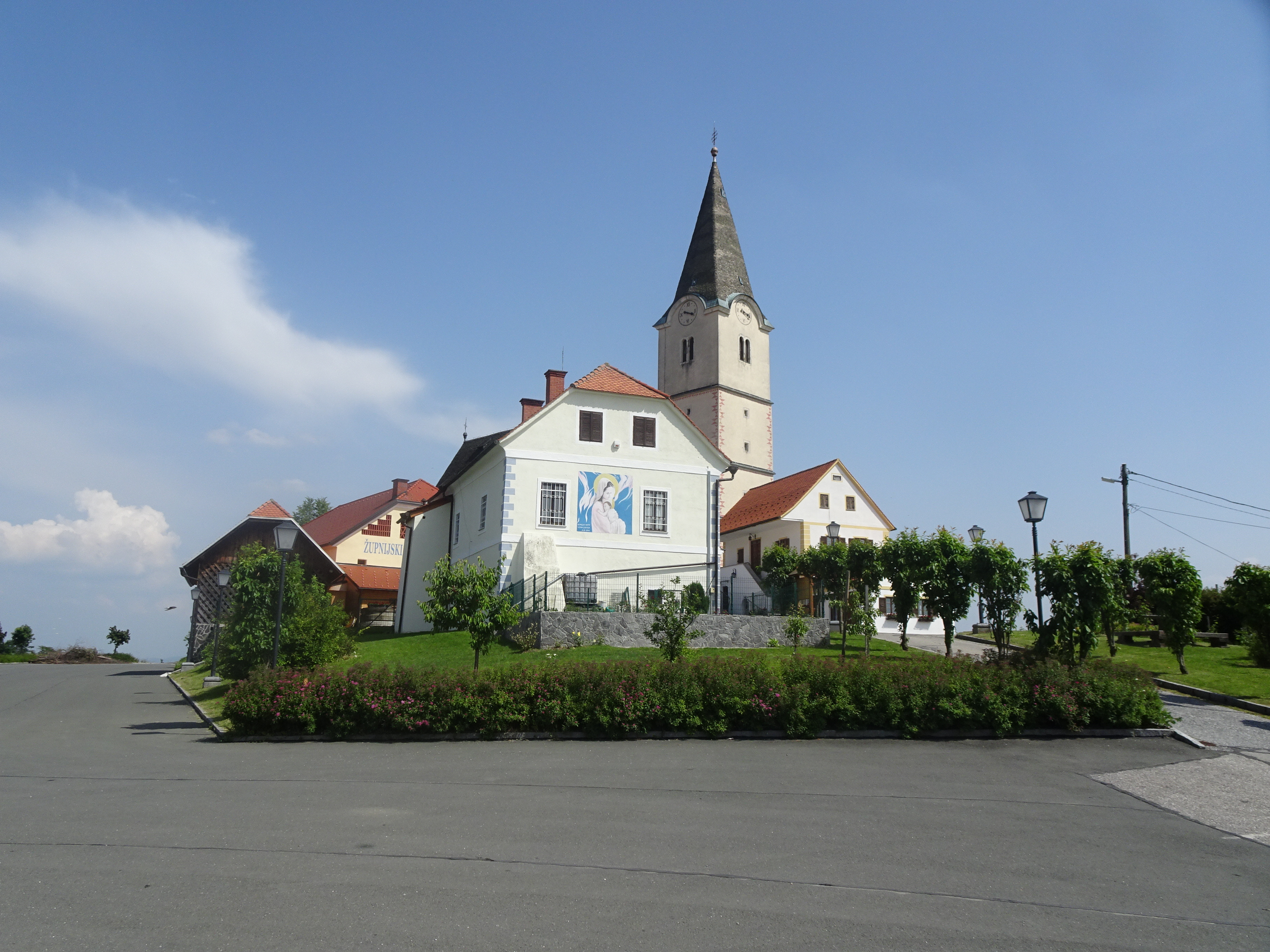 Prihova, župnijska cerkev, Občina Oplotnica